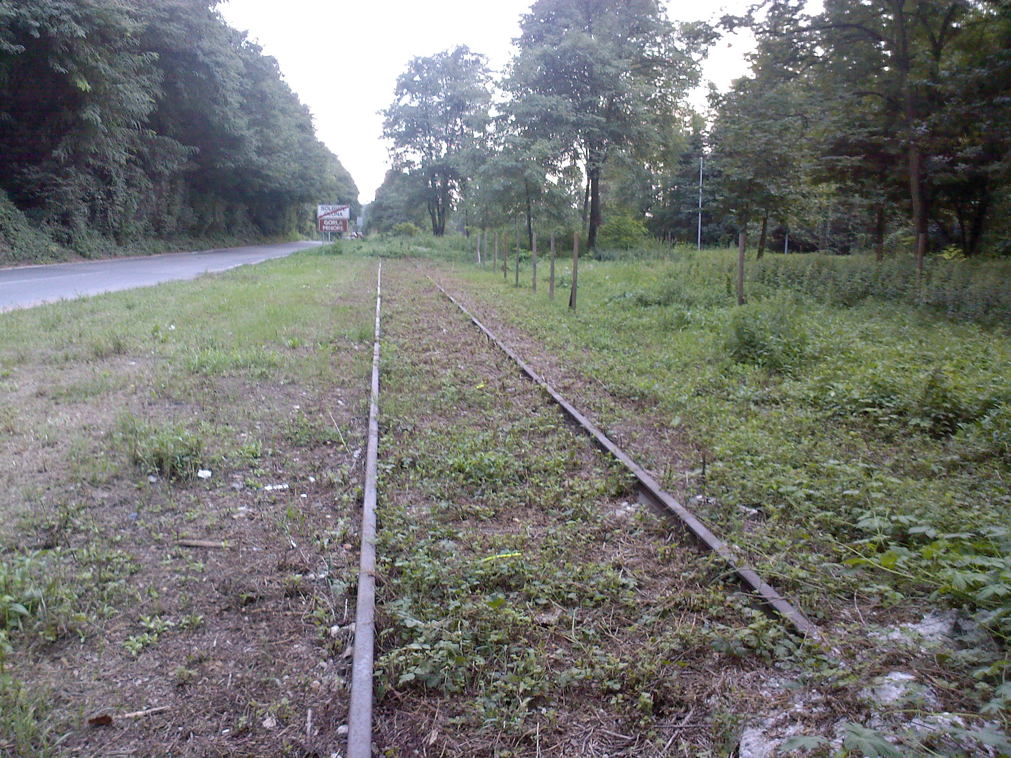 Resti della ferrovia della Valmorea a Solbiate Olona